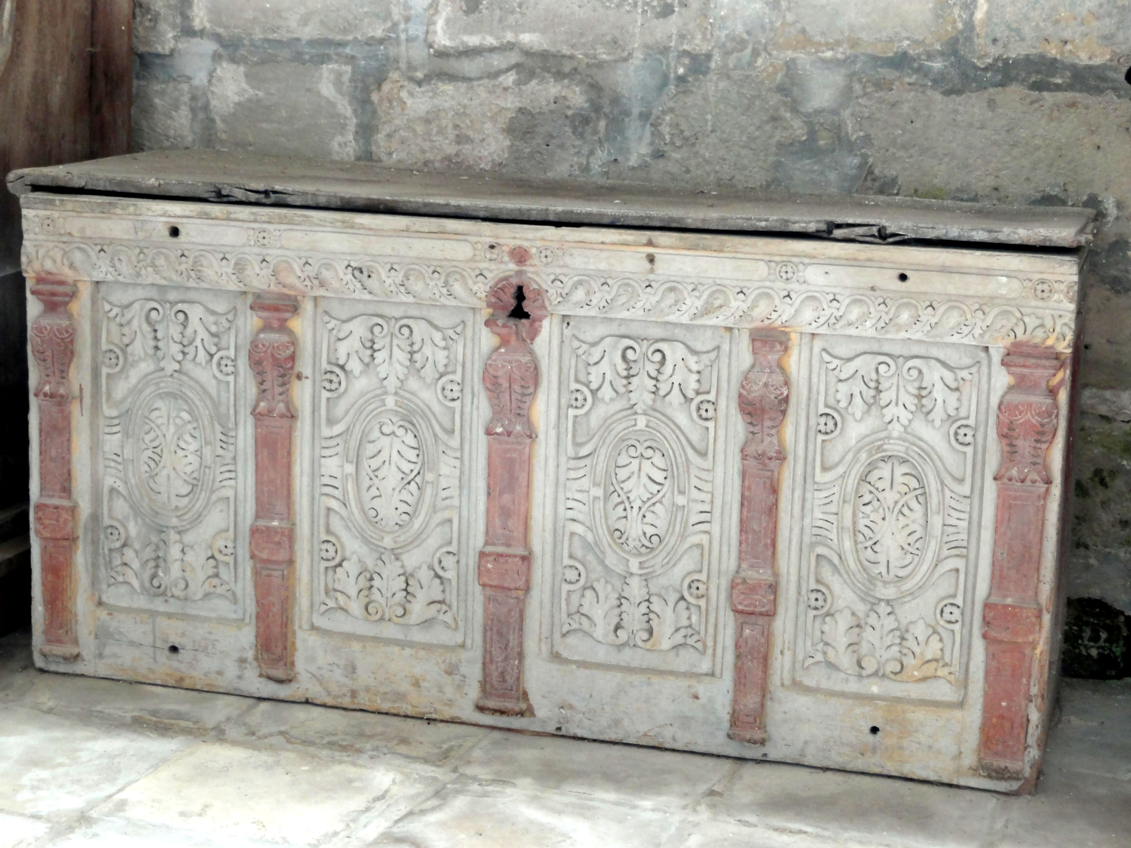 Coffre classé M.H.